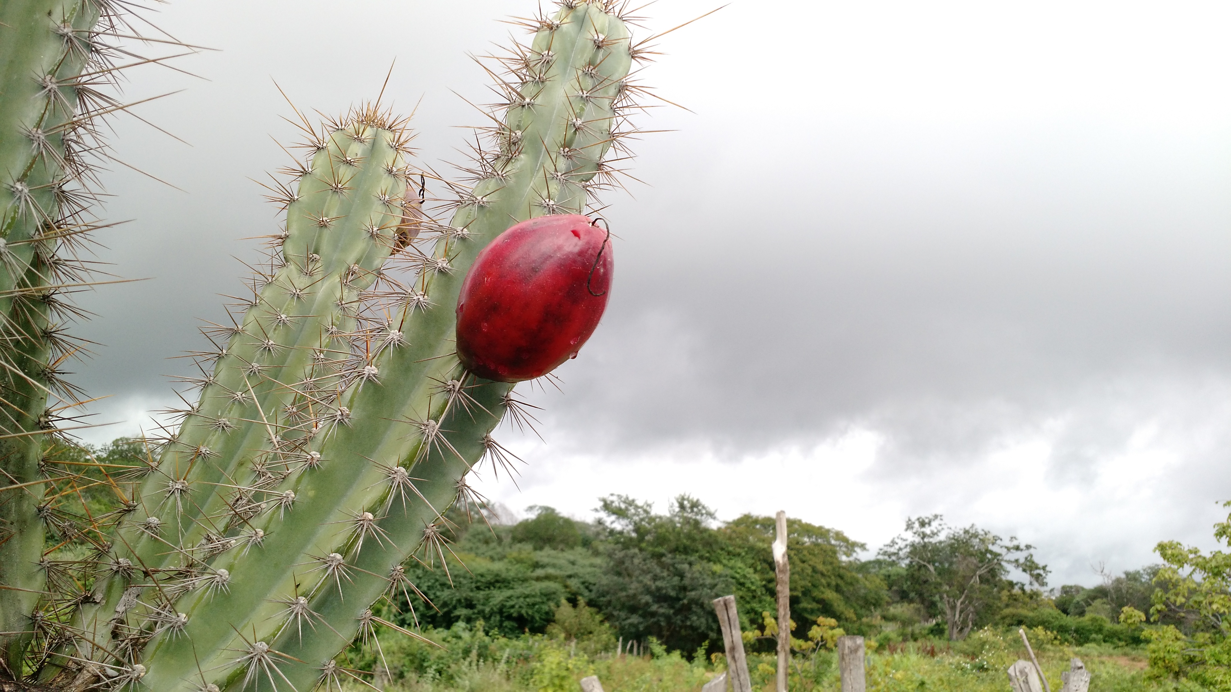 O mais iconico símbolo do sertão, o fruto do mandacaru simboliza a renovação da esperança na caatinga.